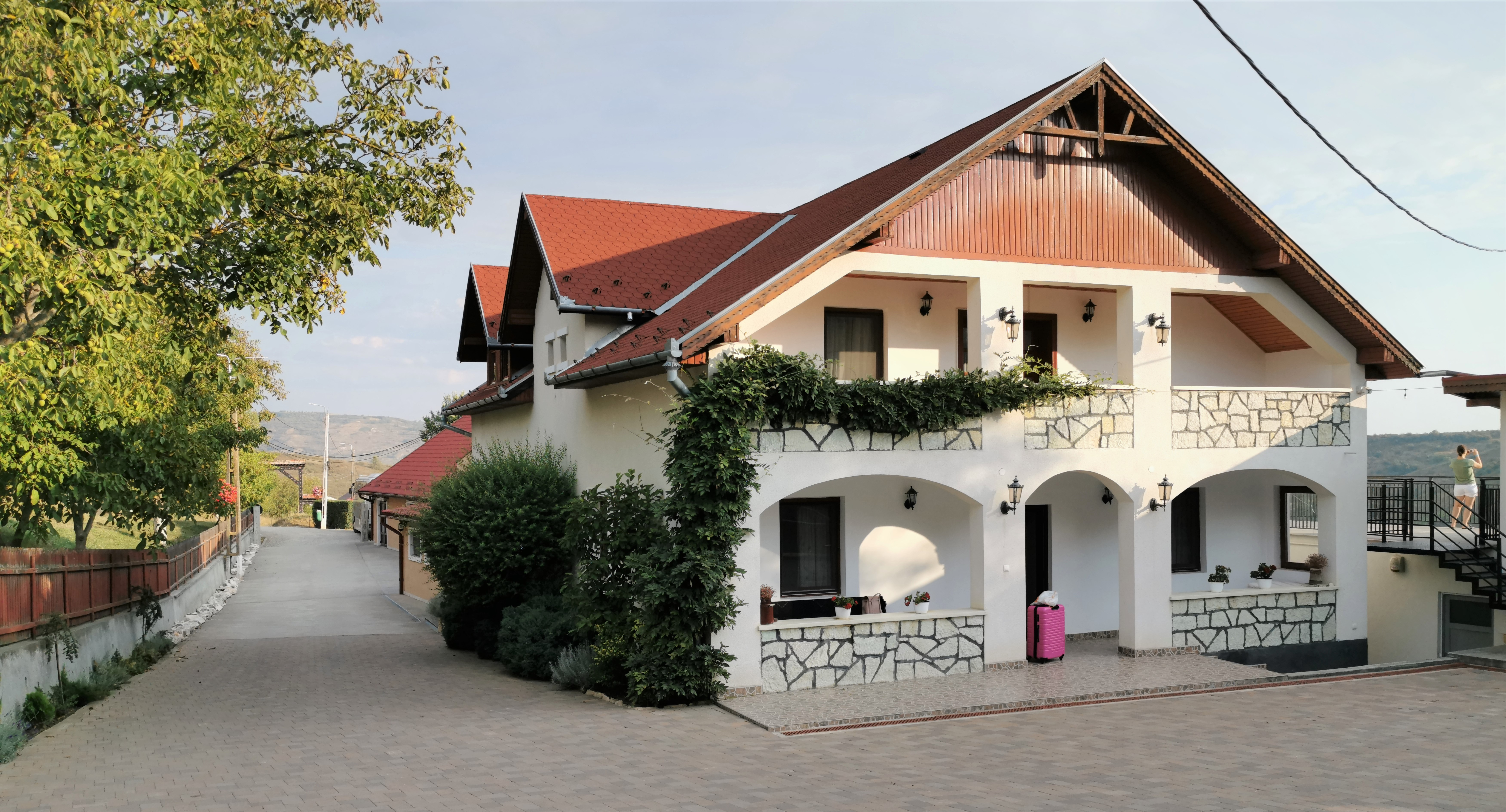 Sóvirág Fogadó. Szék, Kolozs megye, Románia.